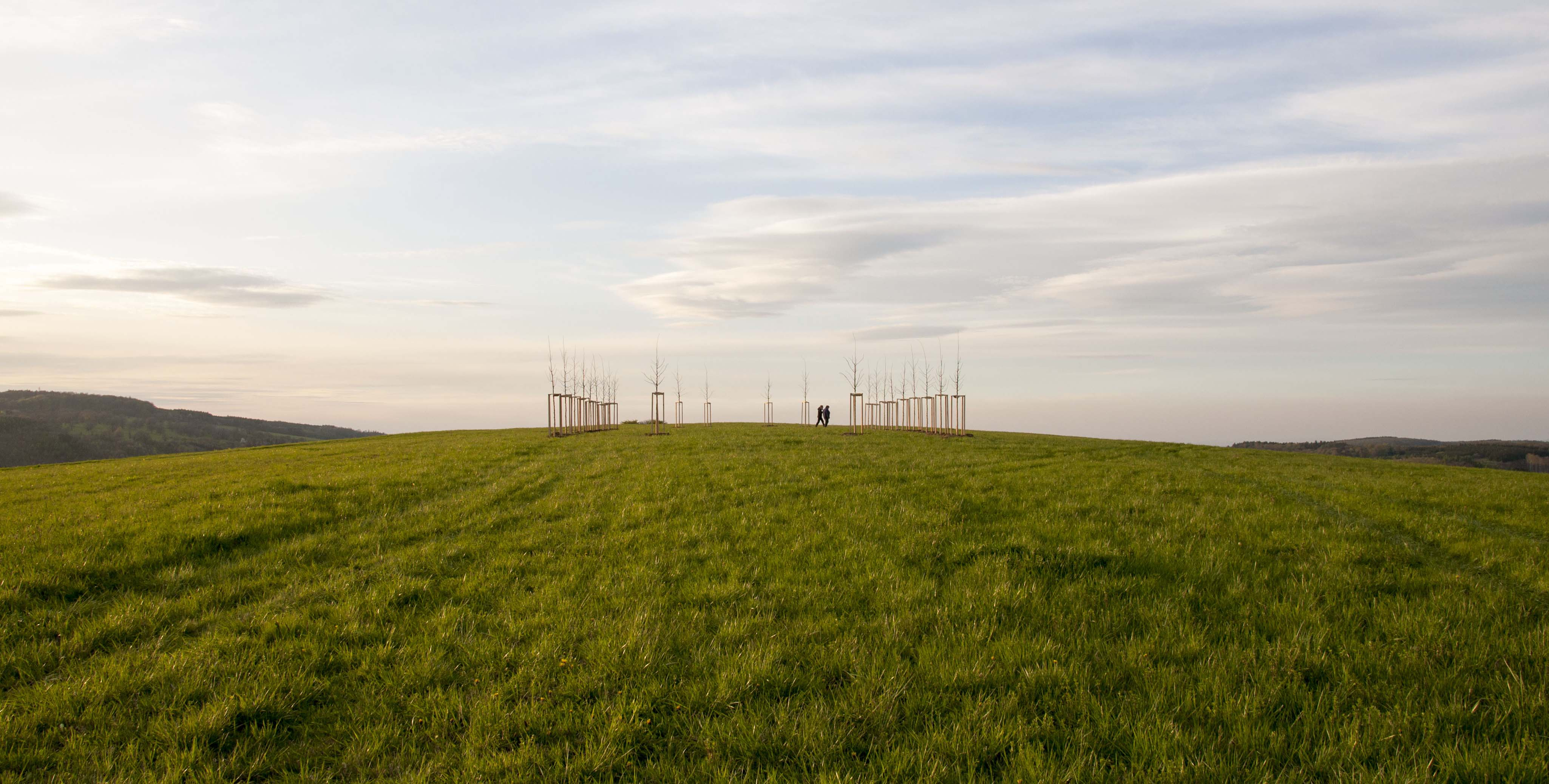 Kaple vnitřního ticha, Nová Lhota, foto: Daniel Matějka